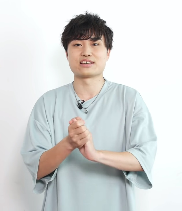 野津山幸宏（声優）